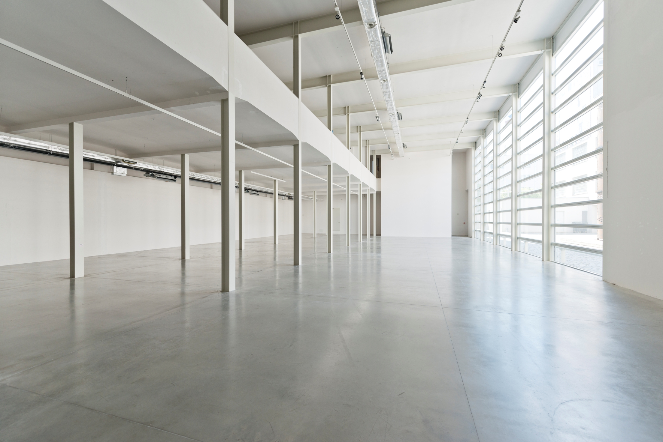 interier